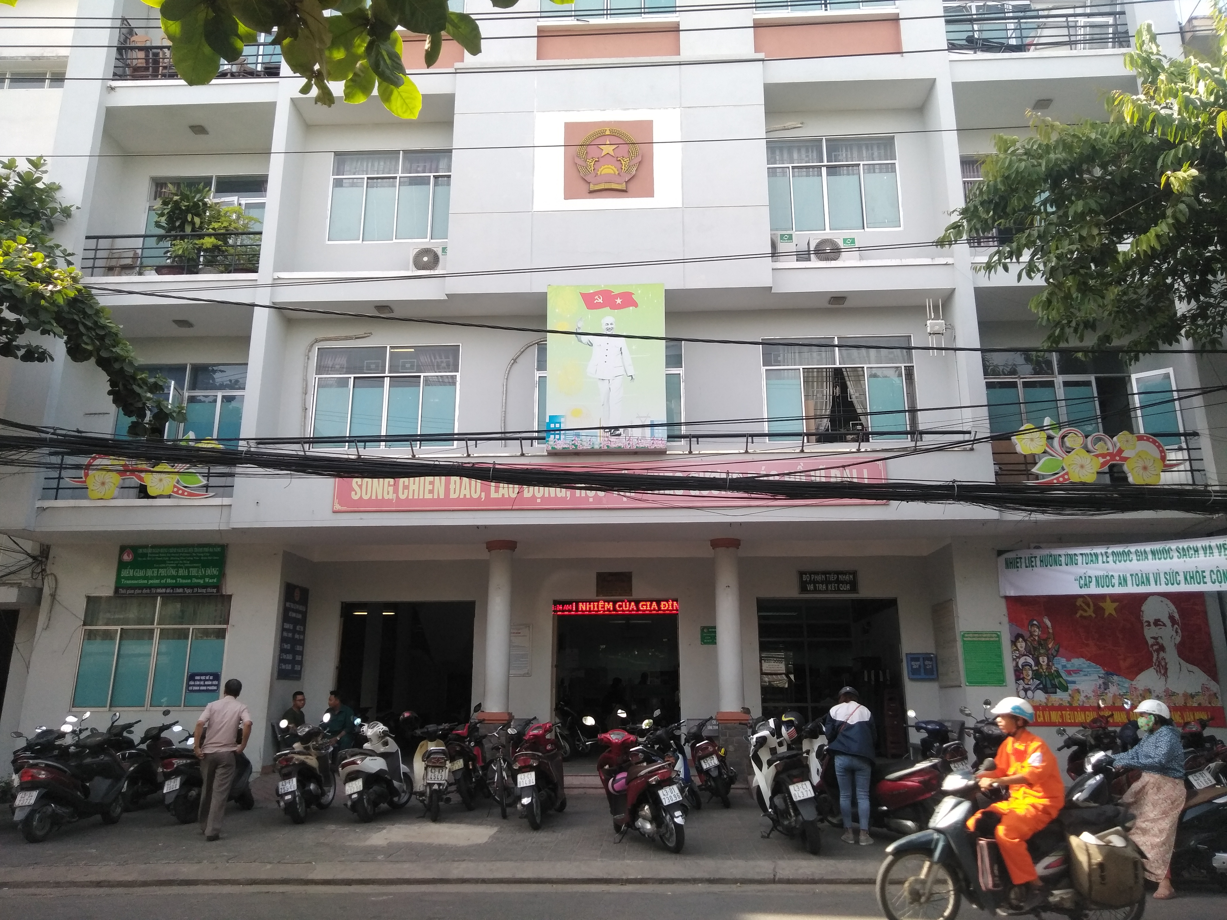 UBND phường Hòa Thuận Đông, Hải Châu, Đà Nẵng